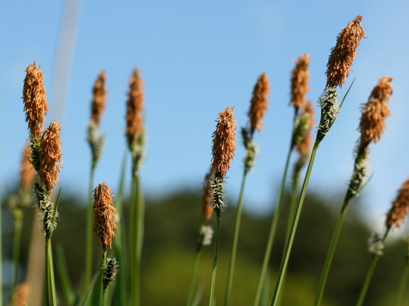 Steife Segge (Carex elata)